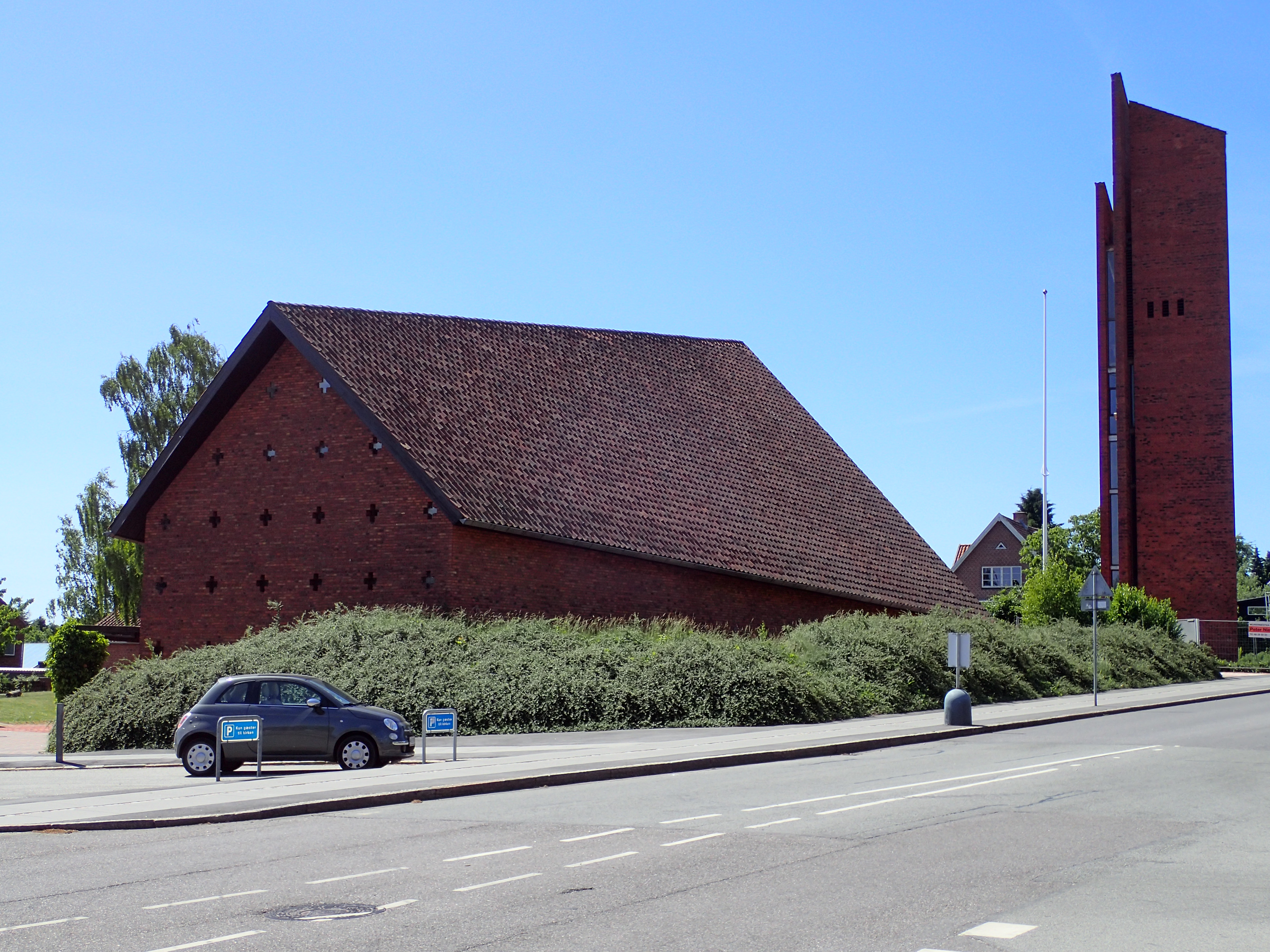 Møllevangskirken